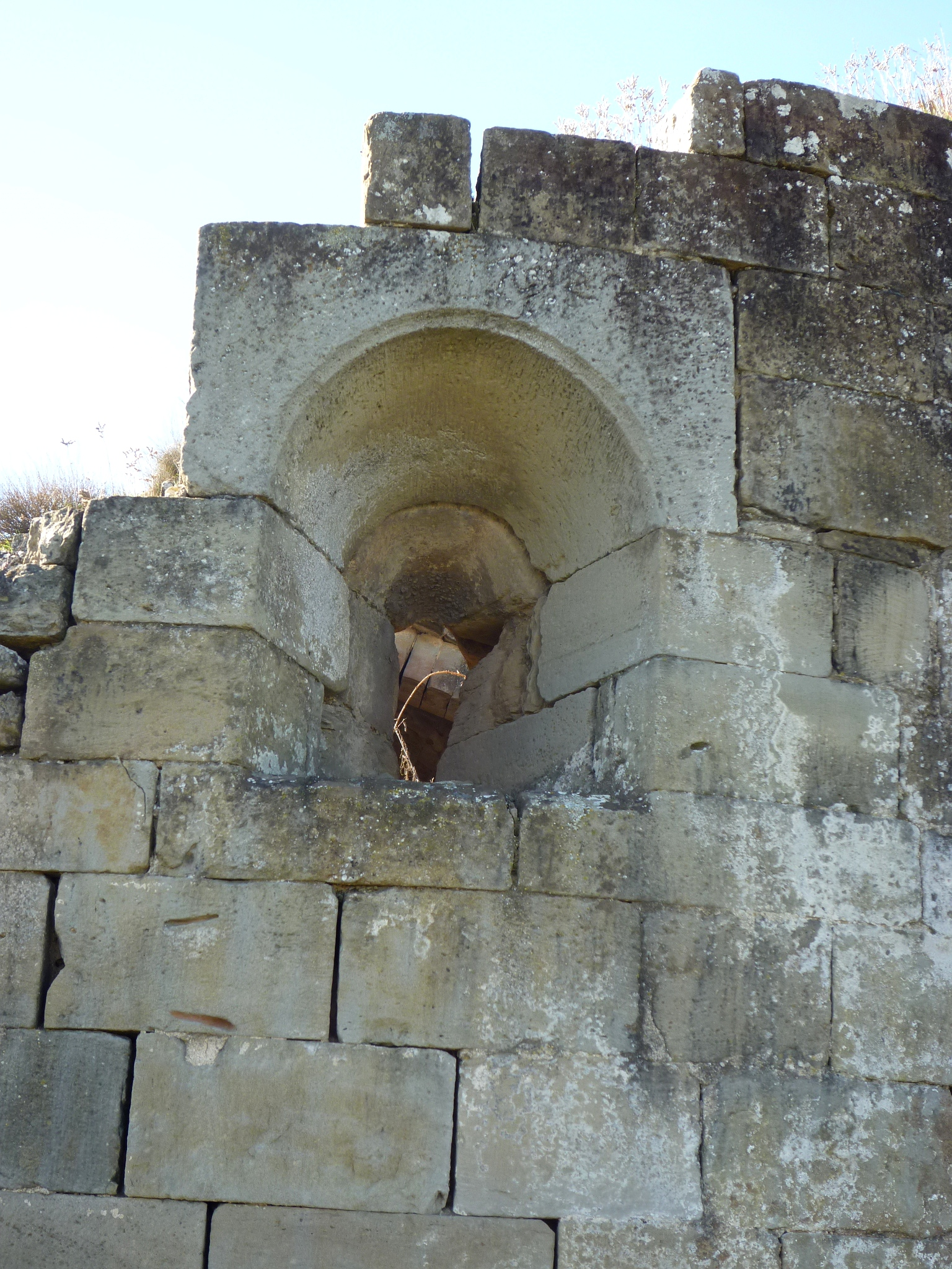 Antic Priorat de Tauladells (Torrefeta i Florejacs): finestra a l'absis